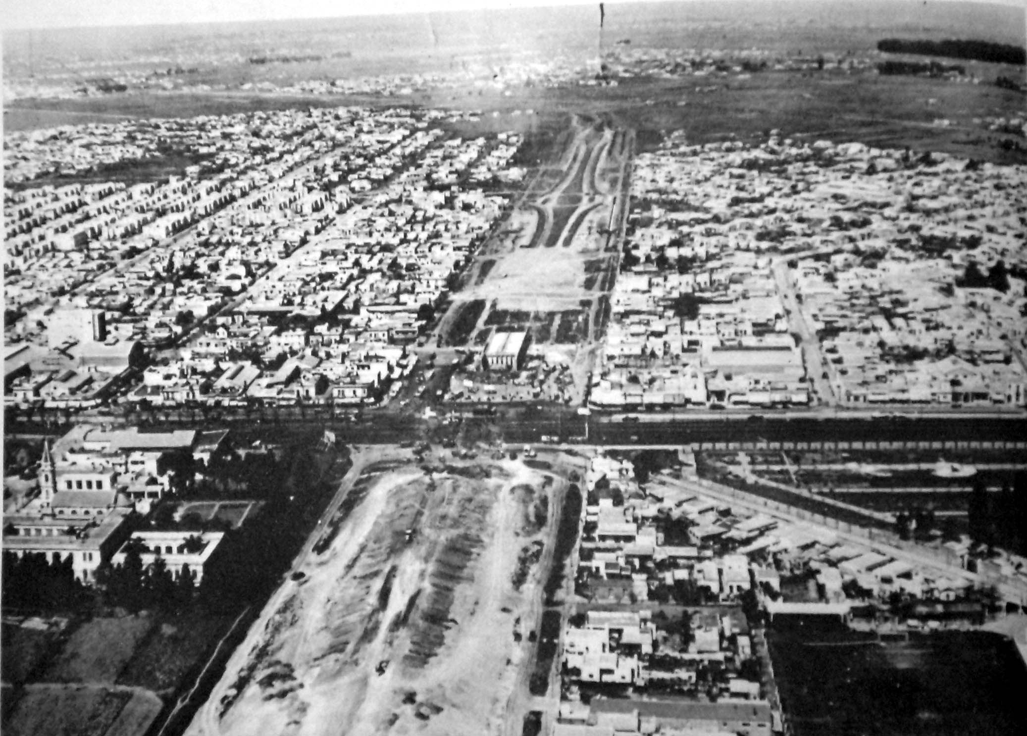 Vista aérea de la construcción de la avenida gral Paz, Buenos Aires